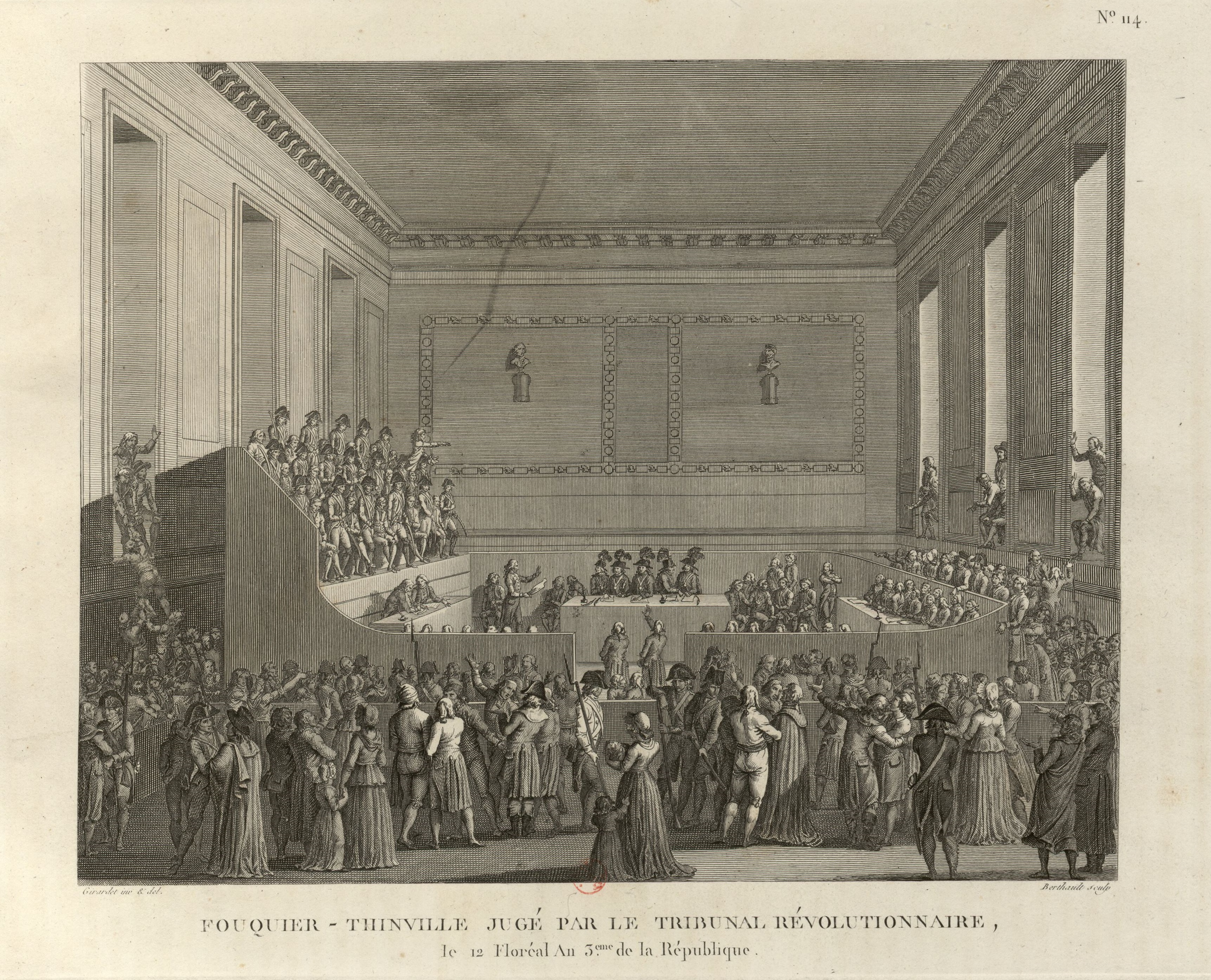 Tableau nº 114, extrait de la Collection complète des tableaux historiques de la Révolution française.